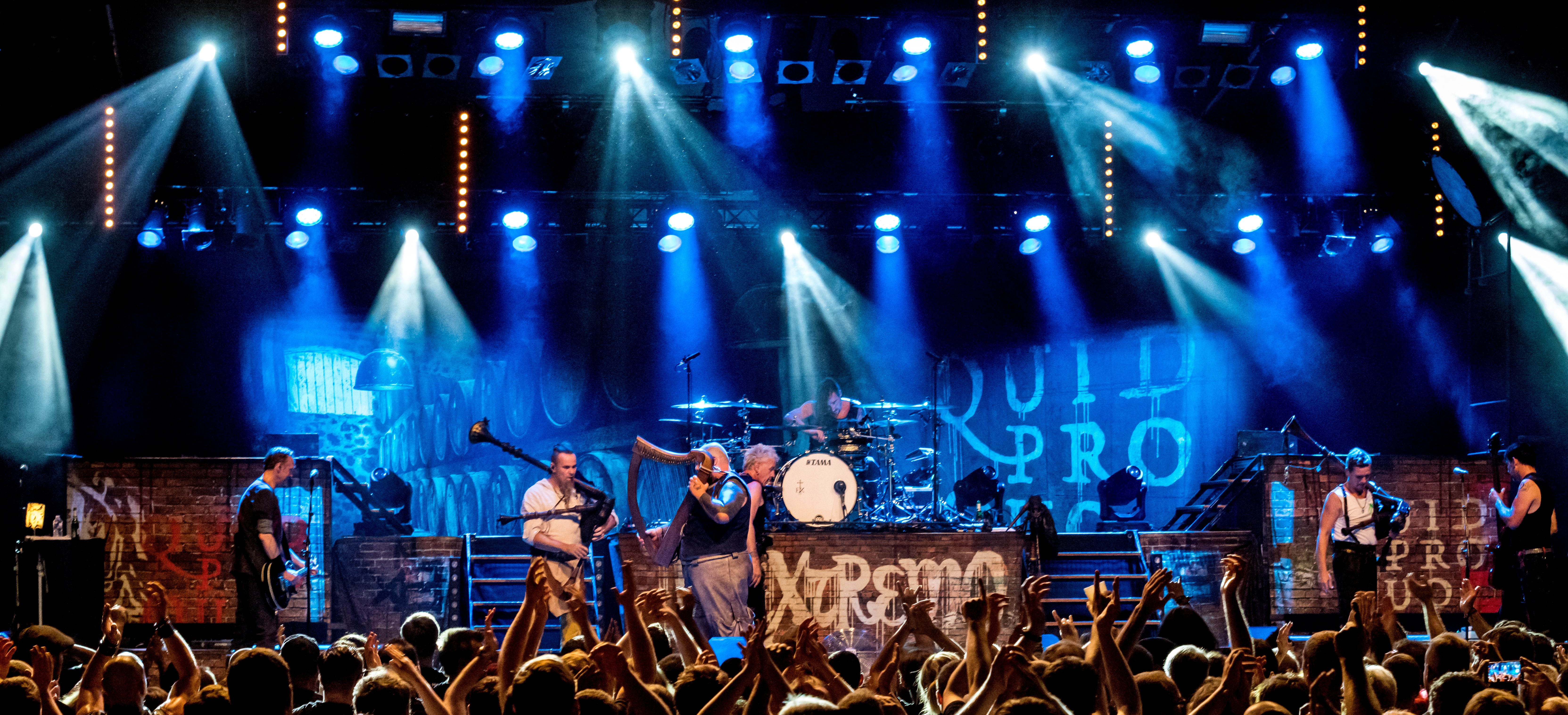 Bilder vom Zelt Musik Festival 2018 in Freiburg im Breisgau In Extremo am 29.07.2018 im Zirkuszelt